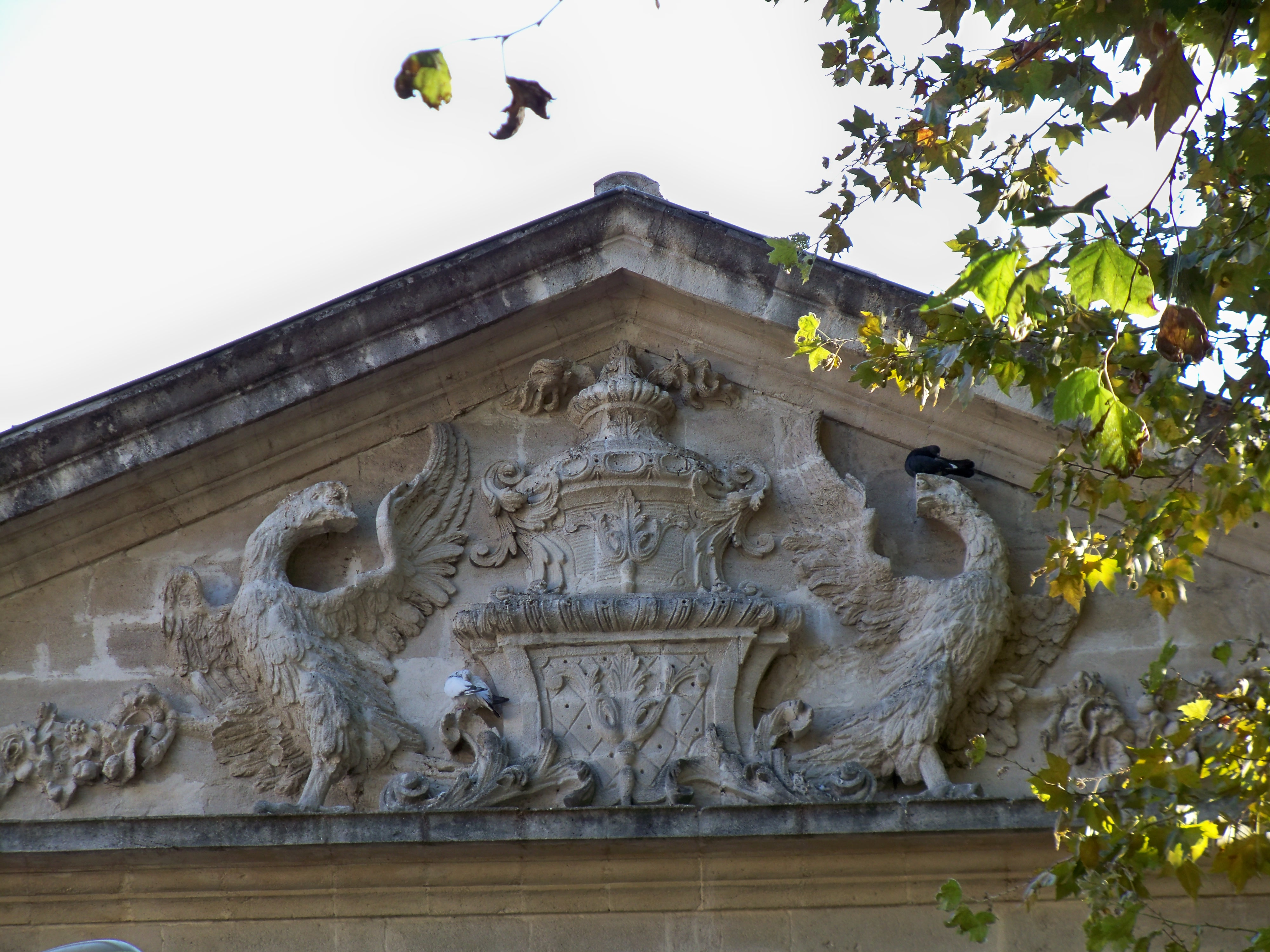 Hotel de la Bastide à Avignon (84) .